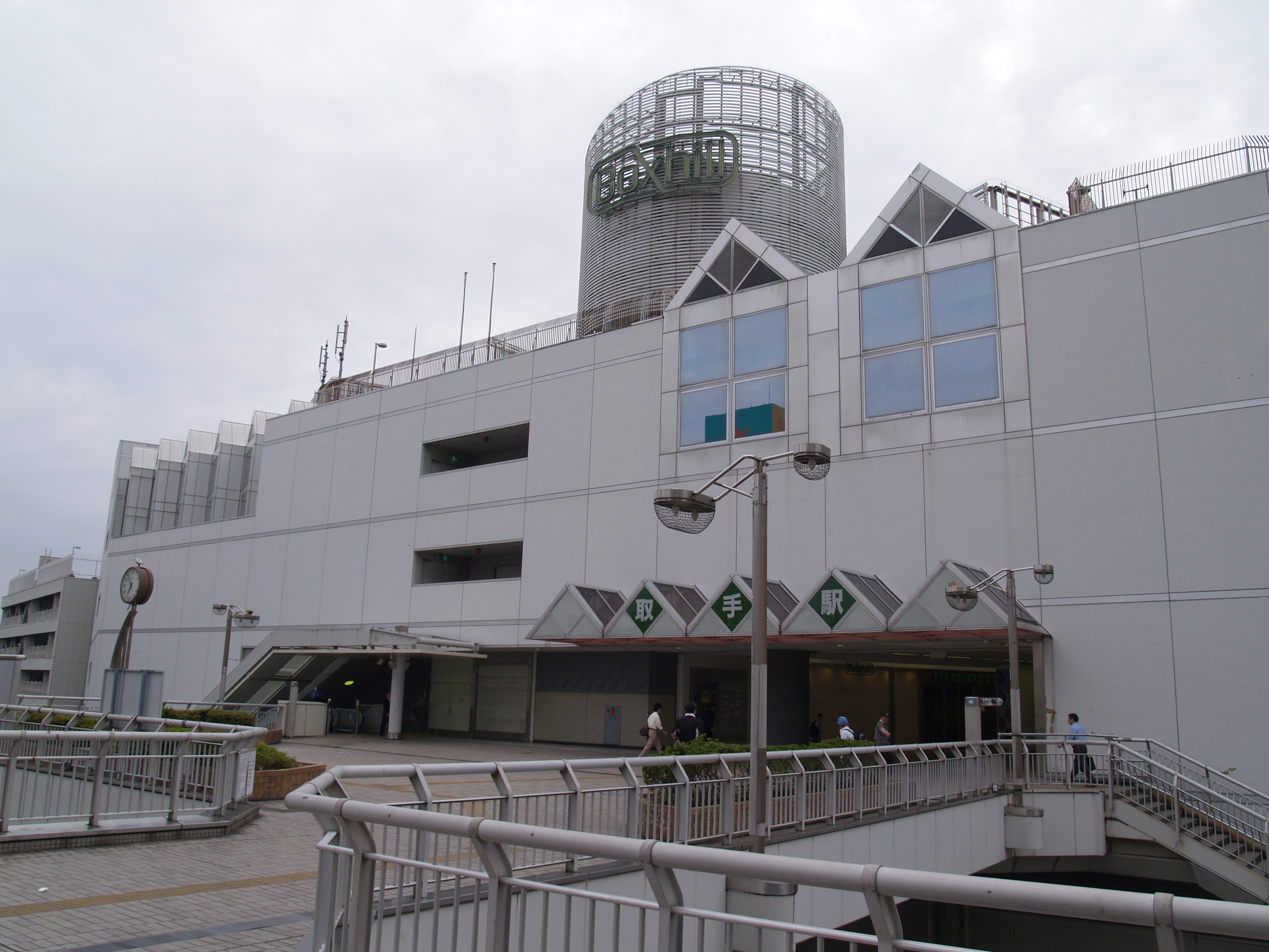 取手駅西口